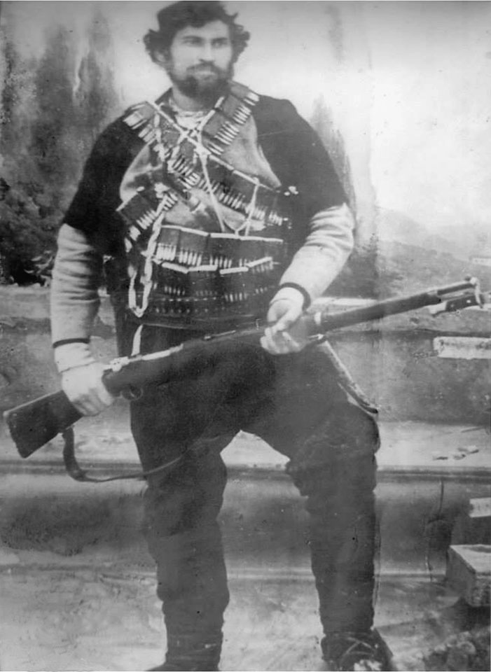 Војвода Крста Ковачевић Трговишки Фотографија комитског војводе Крсте Ковачевића Трговишког из 1910. год у пуној ратној спреми. У Првом светском рату учествује са шесторицом браће. Самостално преводи чету преко Албаније 1915-1916. године. Учествује у пробоју Солунског фронта.